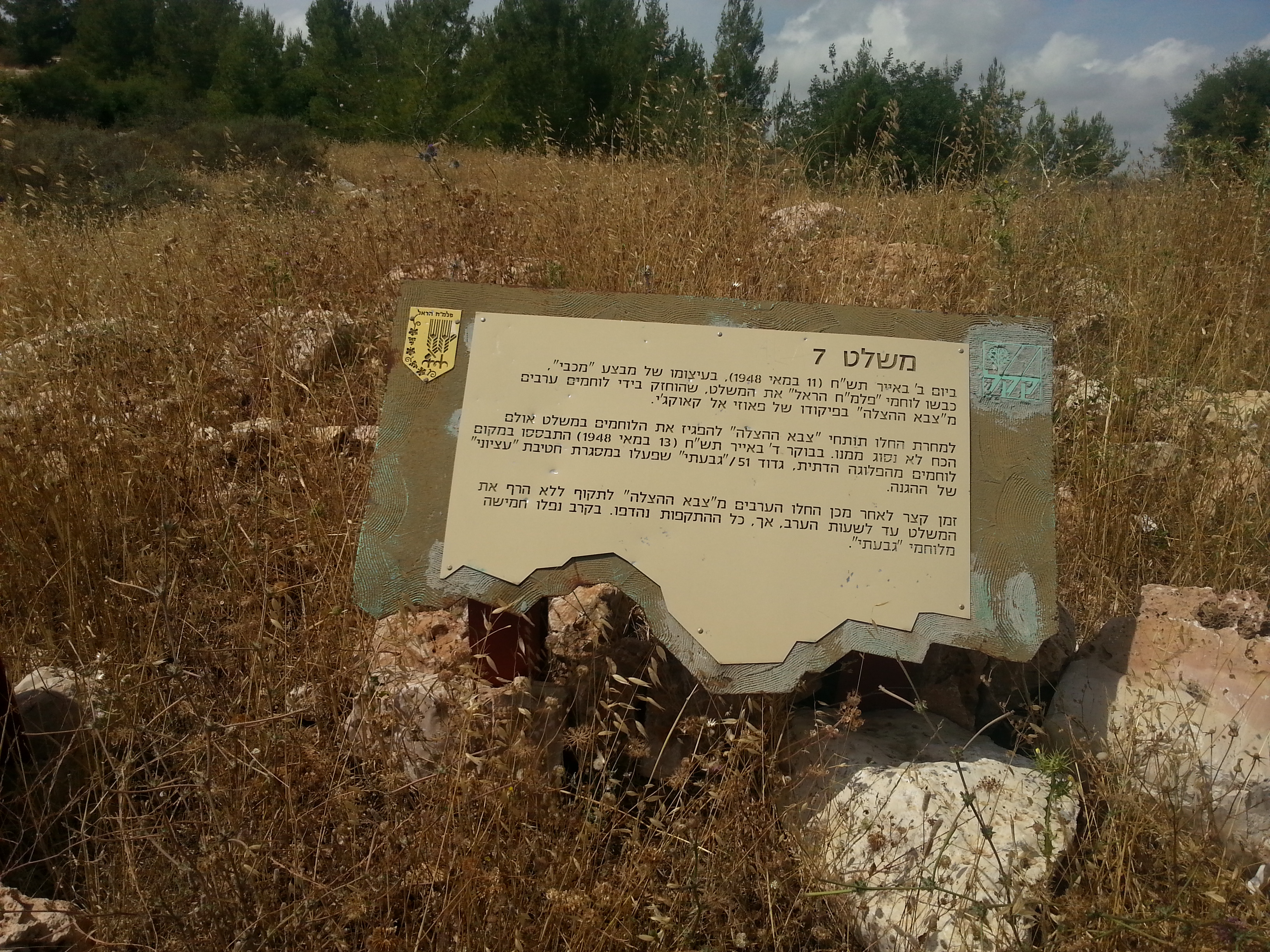 Табличка, указывающая местоположение опорного пункта № 7 в 1947 - 1948 годах. Израиль, Шаар ха-Гай.